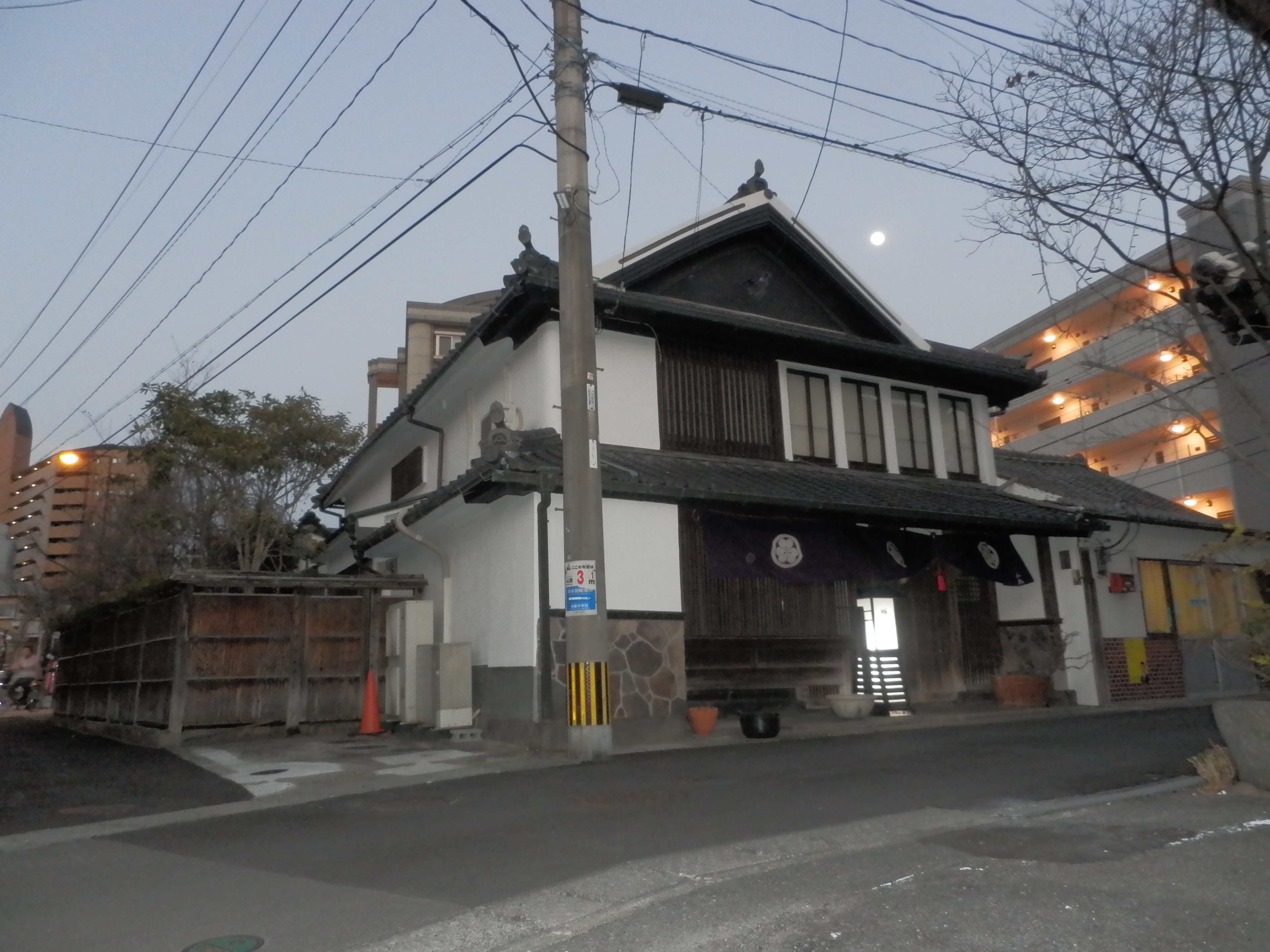 大分県別府市にある糸永家住宅